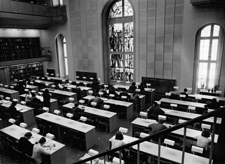 Berlin, "Alte Bibliothek", Lesesaal Zentralbild Deutsche Demokratische Republik 15.3.1970 Ho Auf den Spuren W.I. Lenins Junge Menschen studieren Werke des Marxismus-Leninismus Studentinnen und Studenten aller Sektionen der Berliner Humboldt-Universität steht seit dem 3.3.1969 der Lesesaal der Sektion Marxismus-Leninismus zu Studium der philosophischen Literatur zu Verfügung (hier ein Blick in den großen Lesesaal mit seinen 96 Plätzen). Der Fundus dieser kleinen Bibliothek im restaurierten Gebäude der ehemals Königlichen Bibliothek in der Straße Unter den Linden, im Volksmund auch "die Kommode" genannt, beträgt gegenwärtig rund 16.000 Bände. Im vergangenen Jahr zählten etwa 15.000 Studentinnen und Studenten aller Fachrichtungen zu den ständigen Lesern dieser Einrichtung. Man schrieb das Jahr 1895, als sich der damals 25jährige Lenin in der Leserkartei der Königlichen Bibliothek eintrug. Unter dem Namen Wladimir Uljanow studierte er in den Räumen der "Kommode" die Werke von Marx und Engels sowie Publikationen über die wirtschaftliche Entwicklung und die Arbeiterbewegung in Rußland. Der gesamte Buchbstand der Königlichen Bibliothek wurde 1914 in die von [Ernst von] Ihne, ebenfalls Unter den Linden, erbaute Deutsche Staatsbibliothek überführt. Heute gehört die historische "Kommode" zur Berliner Humboldt-Universität und beherbergt neben dem oben genannten Lesesaal auch einige Sektionen. Reporter: Sturm Copyright: Zentralbild